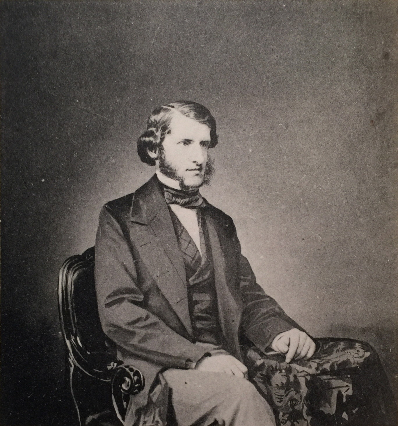 Alfred Rücker, Hamburger Senator 1825-1869